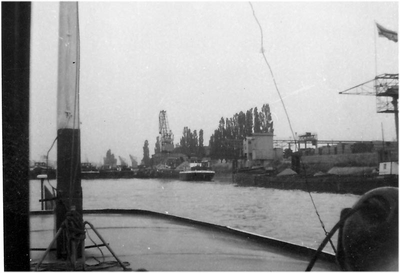 Stromhafen Andernach um 1950